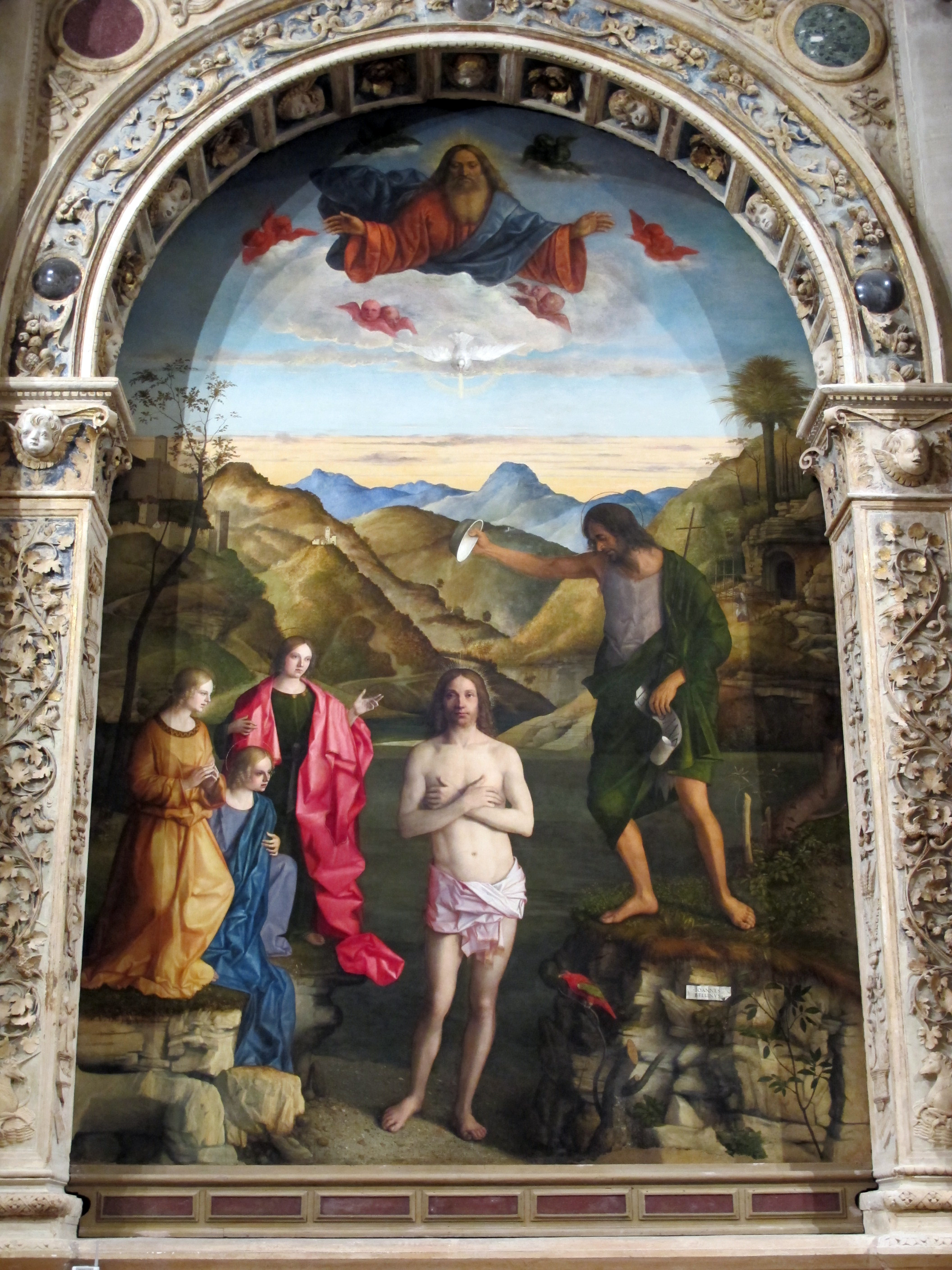 Vicenza, santa corona, altare garzadori con battesimo di cristo di giovanni bellini